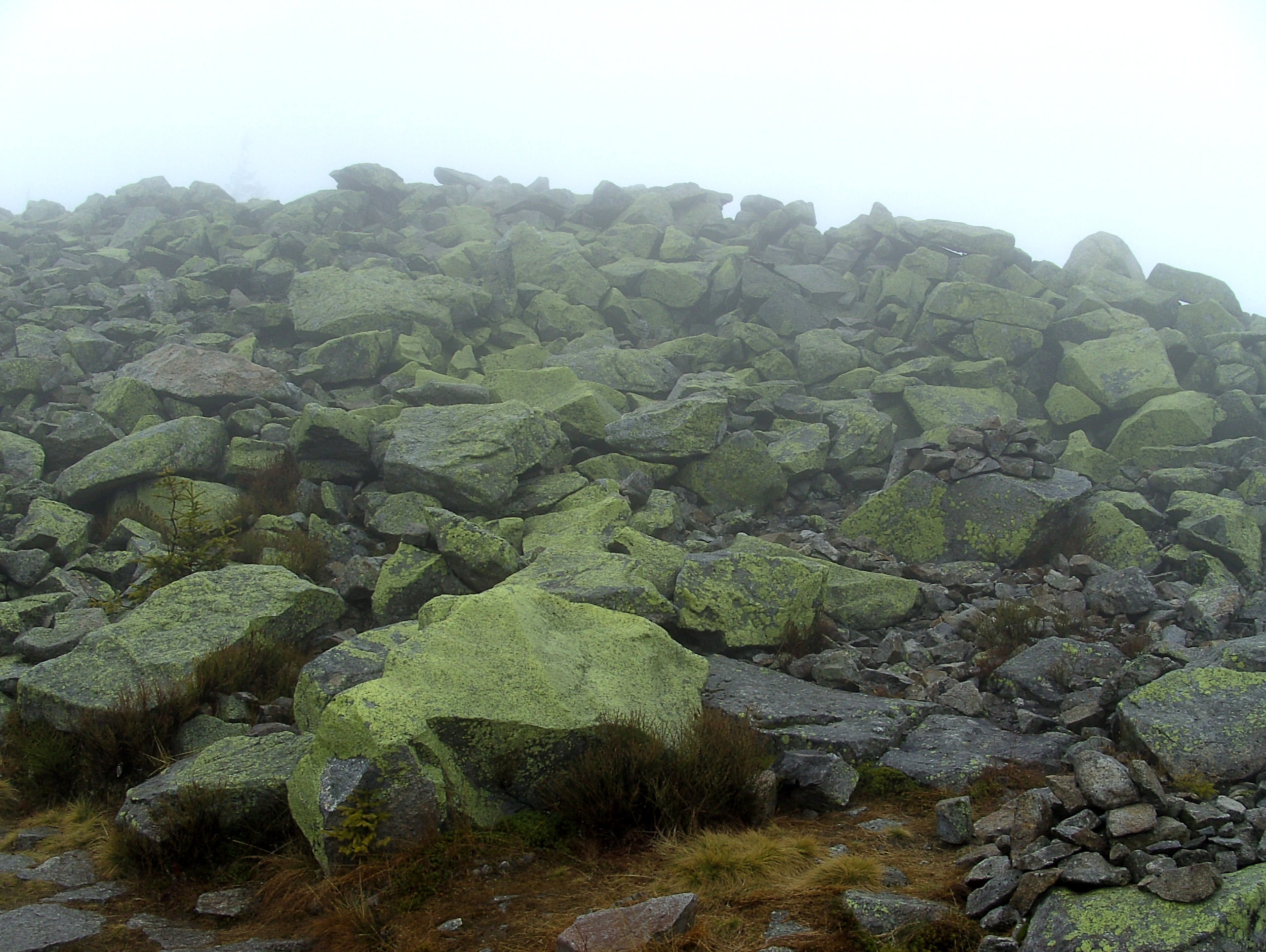 Dichter Nebel auf dem Lusen-Gipfel.